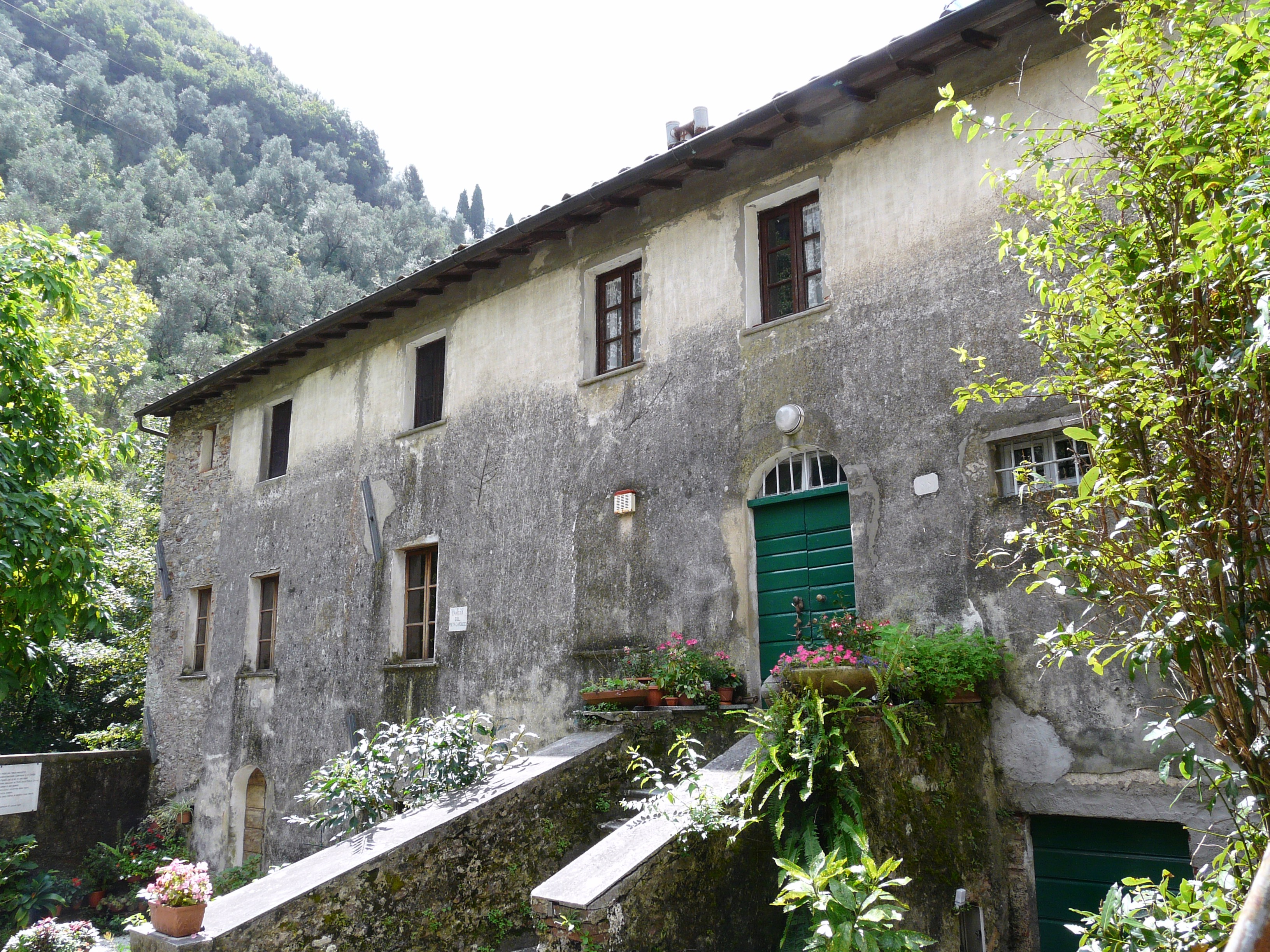 Casa natale di Giosuè Carducci, Valdicastello Carducci, Pietrasanta, Toscana, Italia